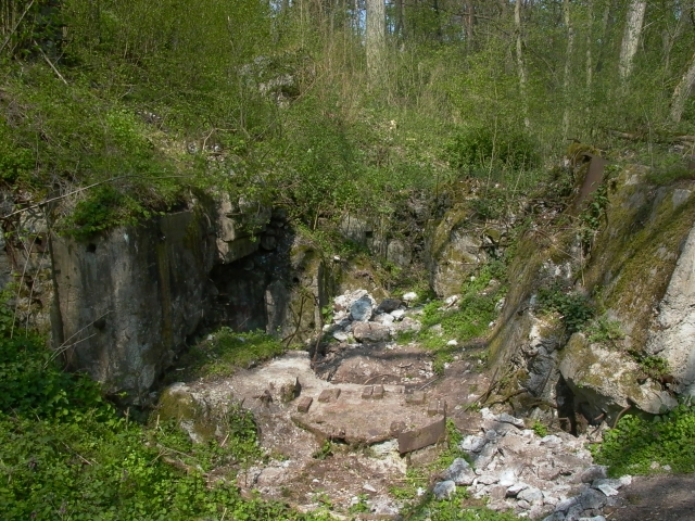 Grupa warowna "Ludendorff" / Werkgruppe "Ludendorff"